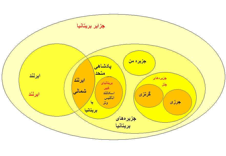 رفع شبهه در مورد نامگذاریهای مربوط به انگلیس، ایرلند، و جزایر بریتانیا بطریق نمودار اویلر. مکانهایی صرفا جغرافیایی. نهاد سیاسی (که ممکن است واژه ای جغرافیایی نیز باشد).